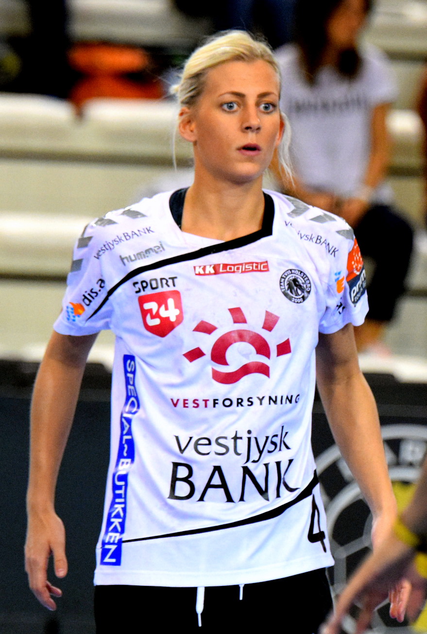 Nathalie Hagman Le 03 avril 2016 lors du match aller de demi-finale de la Coupe des vainqueurs de coupe de handball Issy Paris Hand / Team Tvis Holstebro